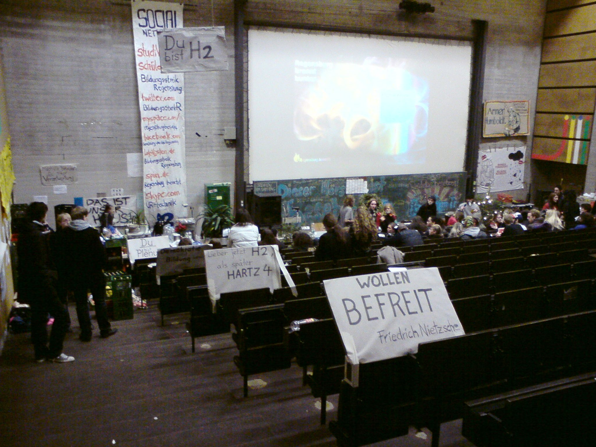 Der Studentenprotest an der Universität Regensburg im Dezember 2009. Hierbei wurde der Hörsaal H2 besetzt.